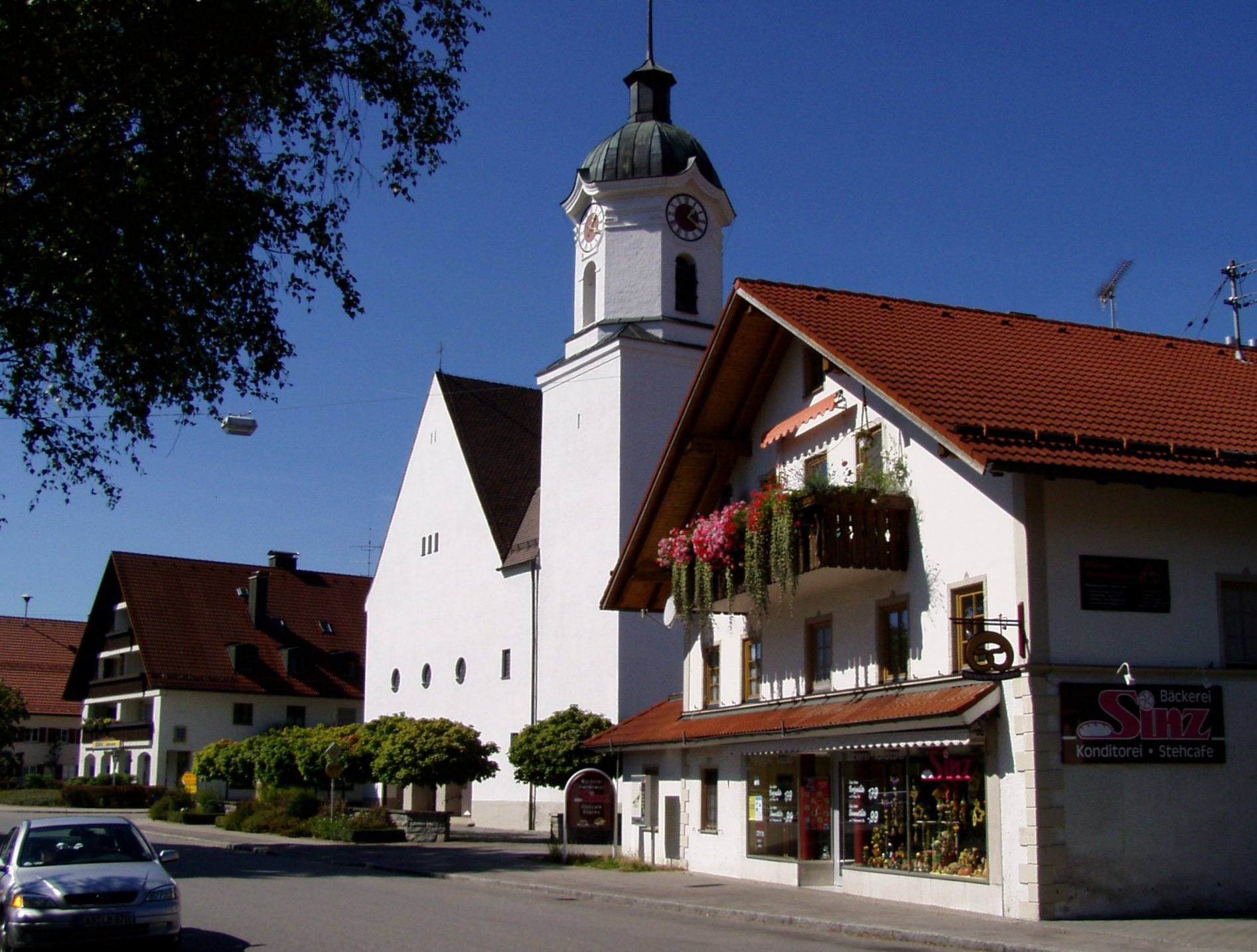 Friesenried